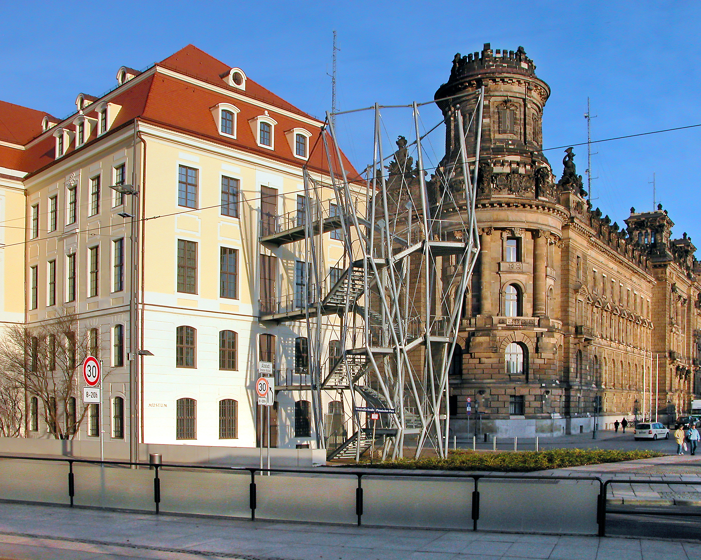 15.01.2007 Dresden-Altstadt, Wilsdruffer Straße / Schießgasse: Links das Landhaus, frühklassizistisch (1770-1776 von F. A. Krubsacius). Heute Museum für Stadtgeschichte. Postmoderne Feuertreppe 2005/06 (Architekt Rolf Klinkenbusch). Rechts d. Polizeipräsidium. Das Gebäude für die Königliche Polizeidirektion wurde 1895-1900 nach Plänen des Architekten Julius Temper errichtet. [DSCN20509]20070115020DR.JPG(c)Blobelt